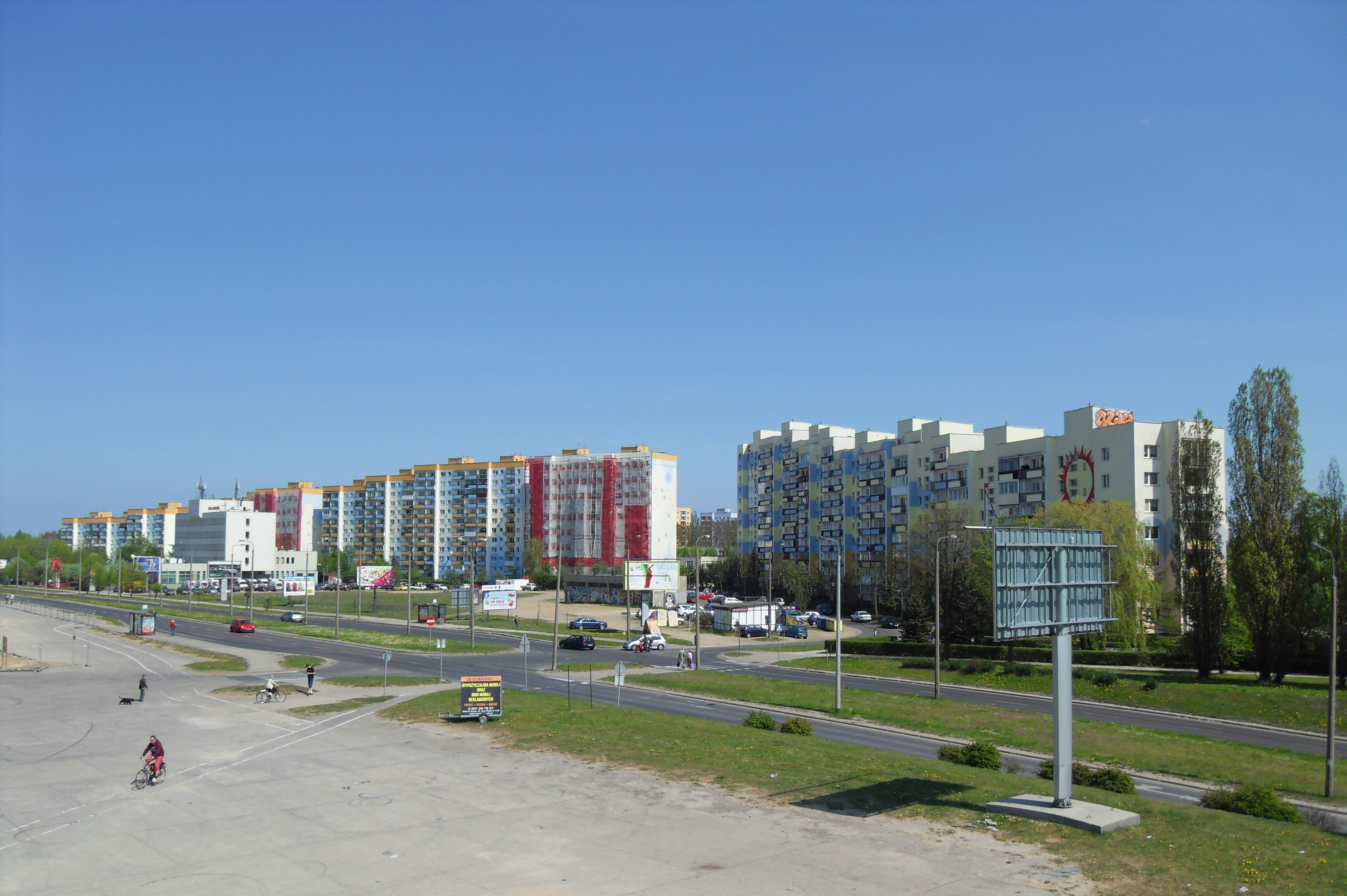 Gdańsk Zaspa Rozstaje. W środku al. Jana Pawła II, w tle bloki przy ul. Burzyńskiego 12 (po lewej) i 6 (po prawej).